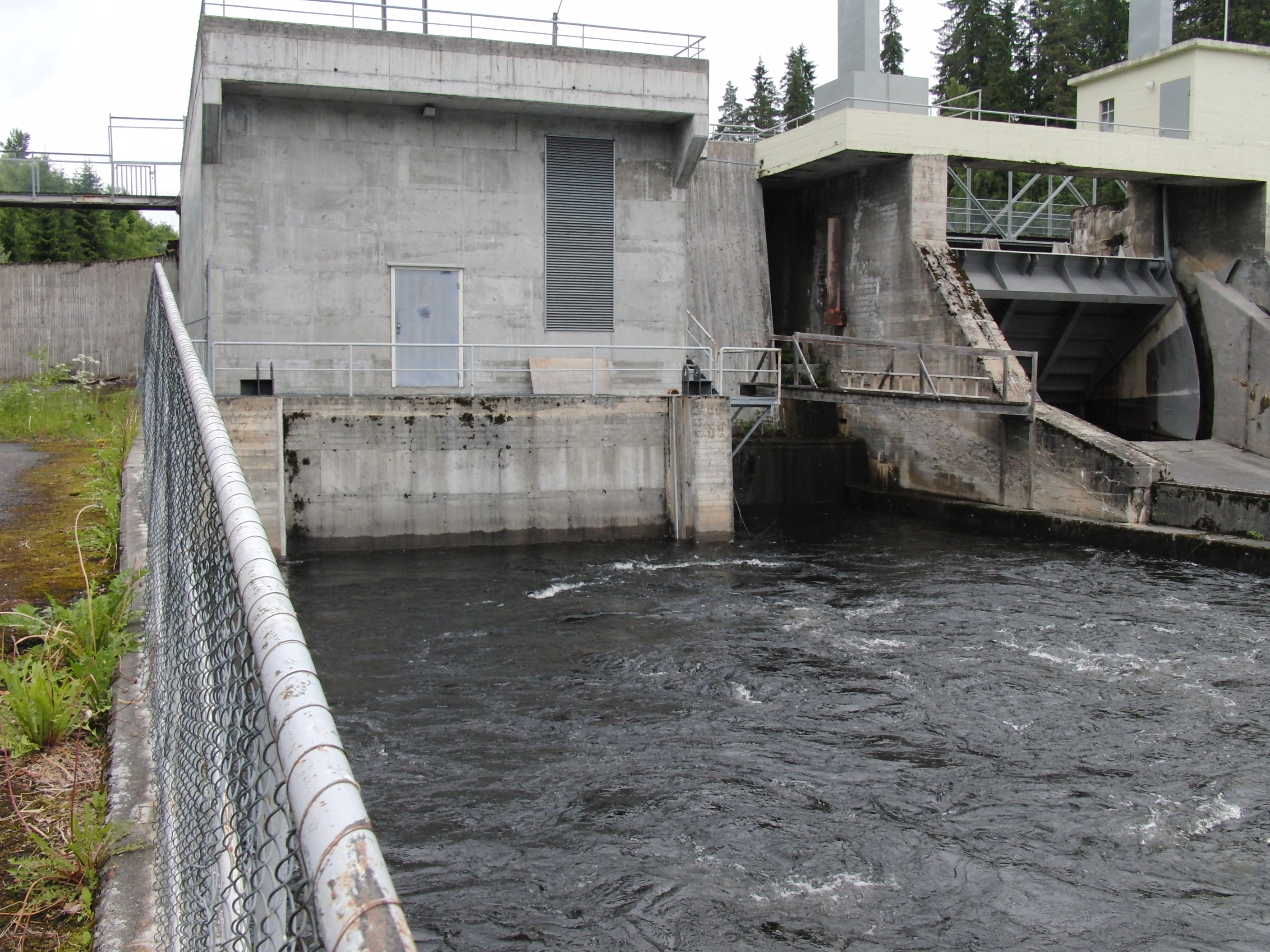 Bergerfoss II kraftverk